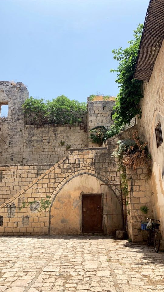 قصر طوقان في مدينة نابلس سامح منصور